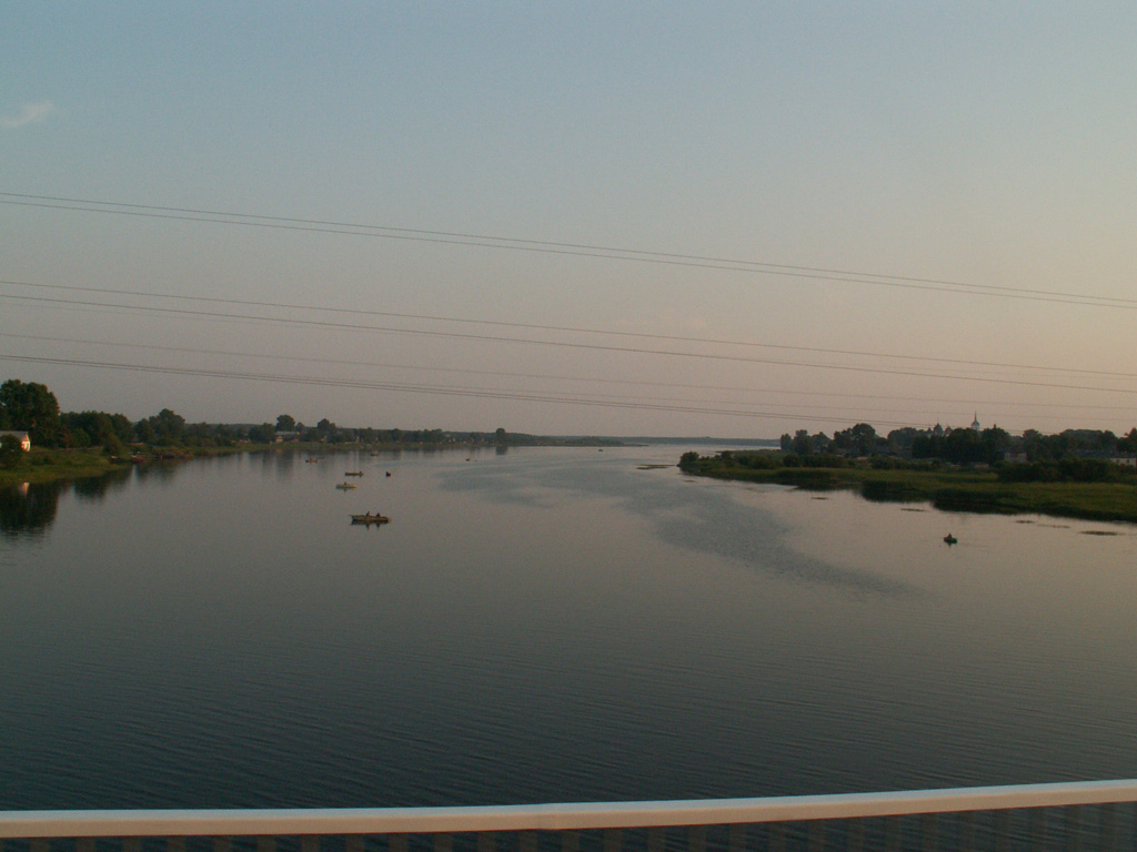 река Онега с моста